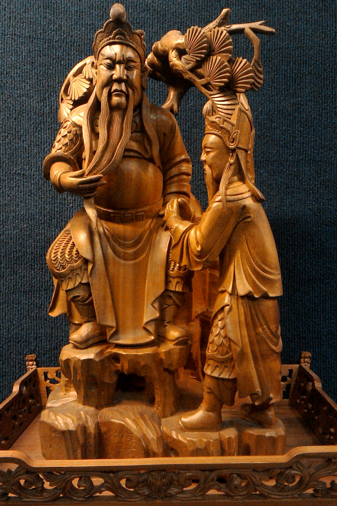 黃龜理「張文遠約三事」木雕,新北市板橋區第二區忠翠里